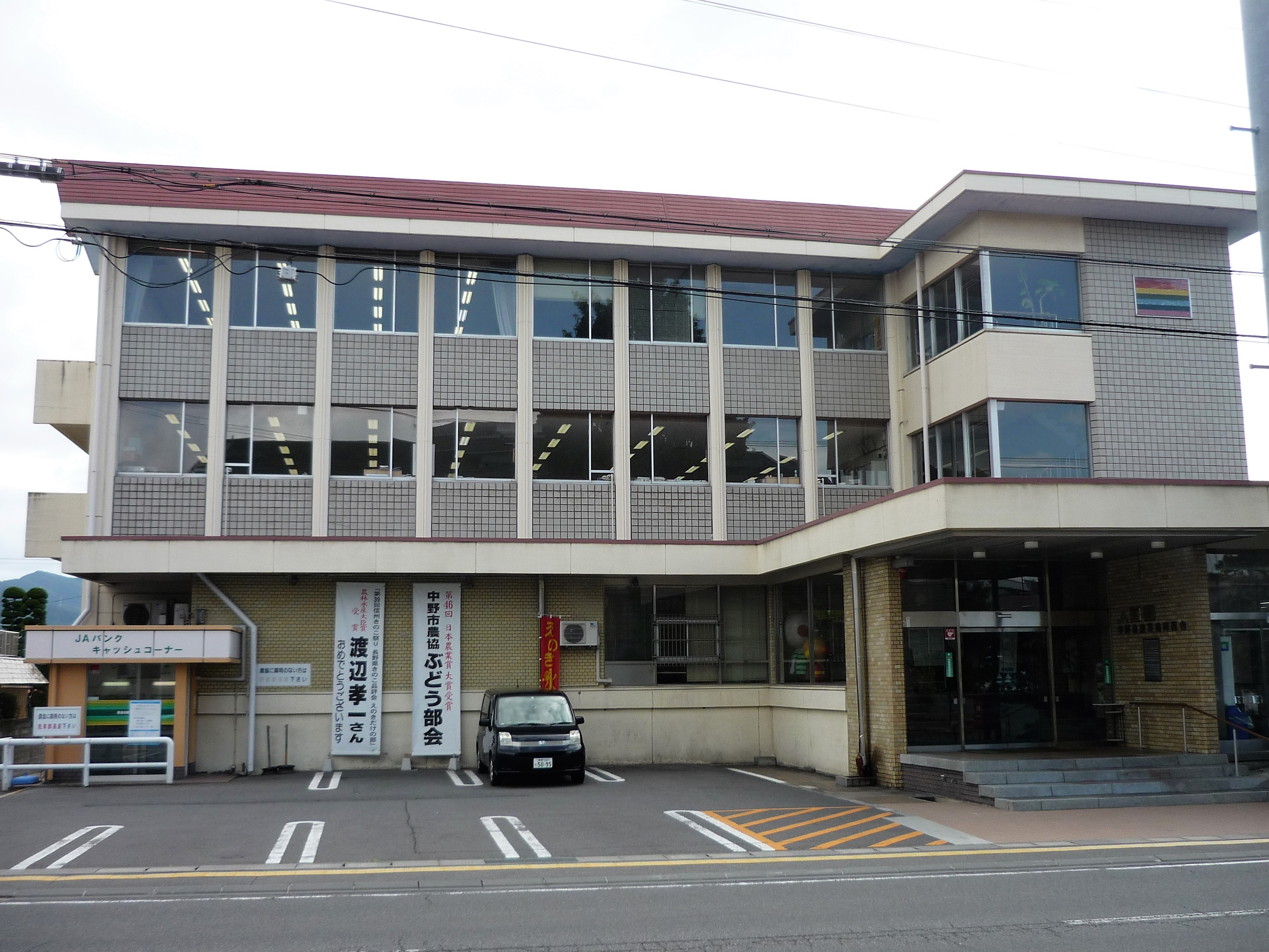 中野市農業協同組合本所